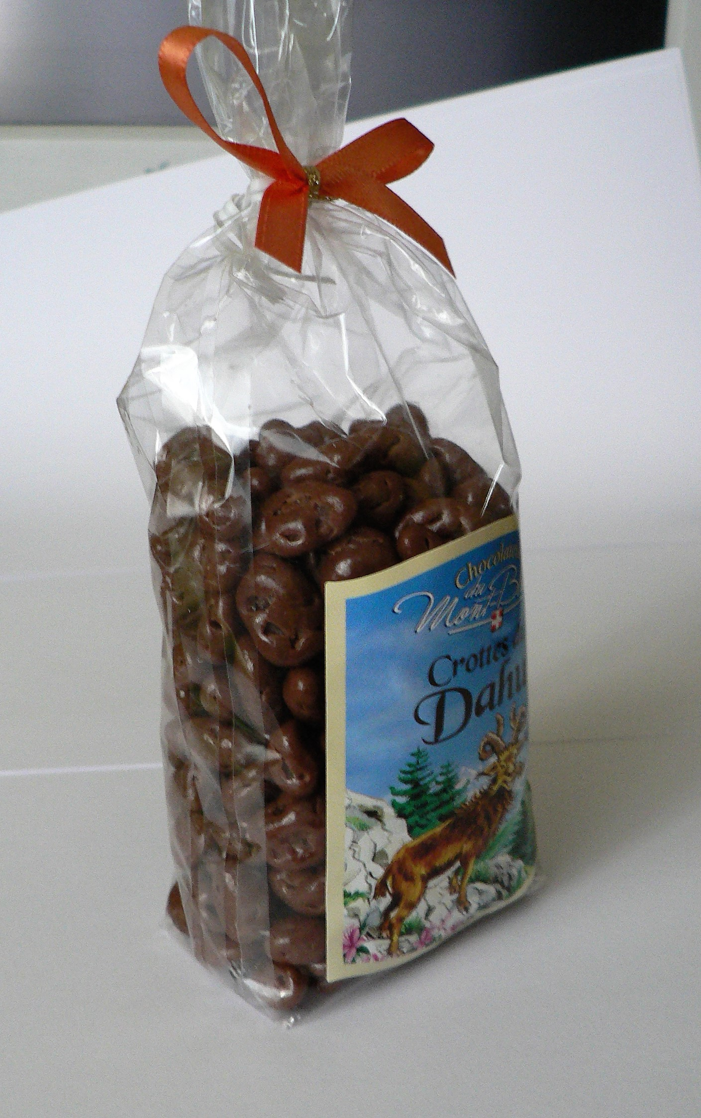 confiserie appelée "Crottes de Dahu", de la Chocolaterie du Mont Blanc de Sallanches, à la vente au supermarché à Grenoble. Des raisins enrobés de chocolat au lait au nom évocateur.Le marketing de ces crottes est basé sur l'humour scatologique (et la moquerie aux enfants sur l'existence "scientifiquement prouvé par les crottes" du Dahu, animal mythologique).